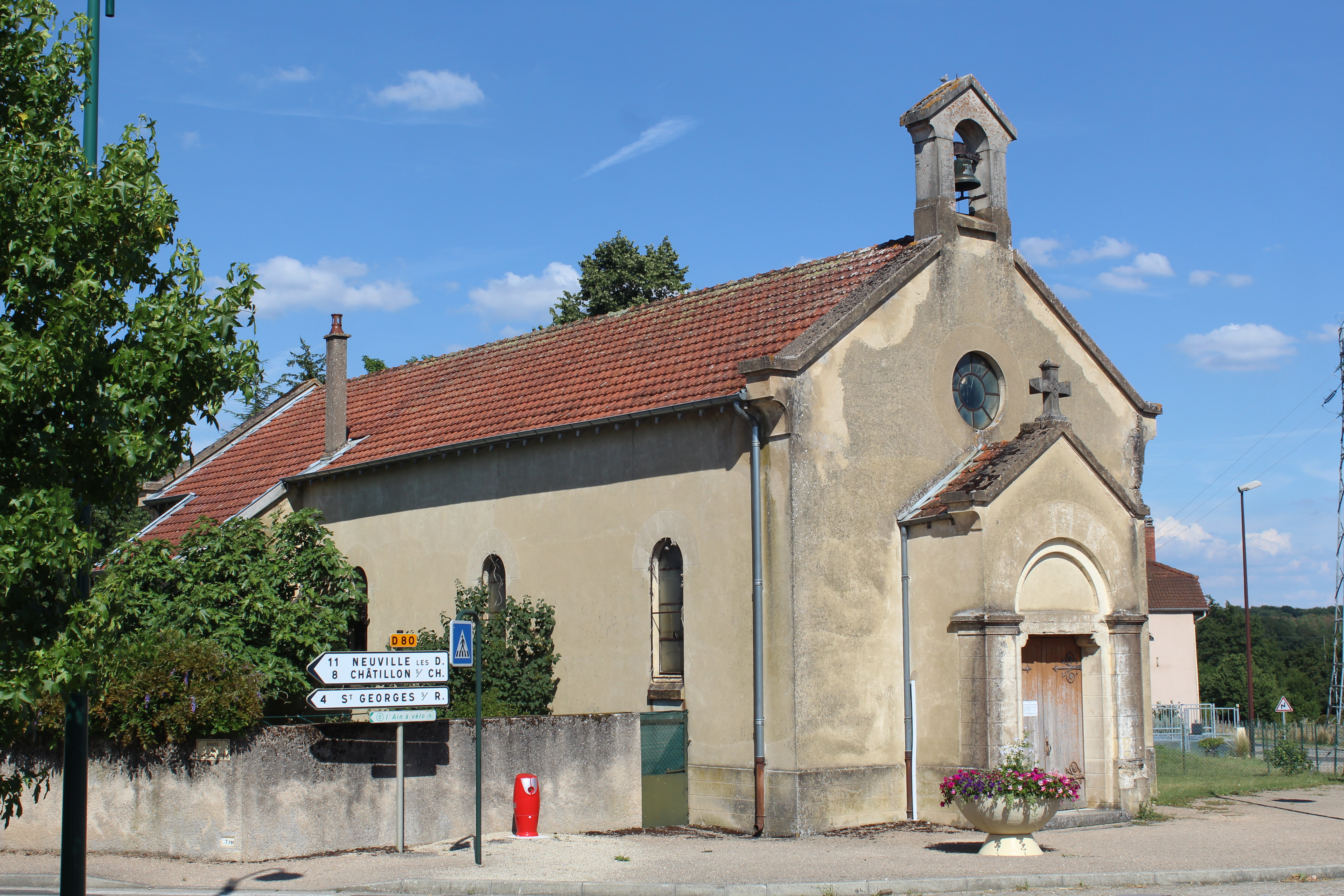 Église Notre-Dame-de-l'Assomption de La Chapelle-du-Châtelard.